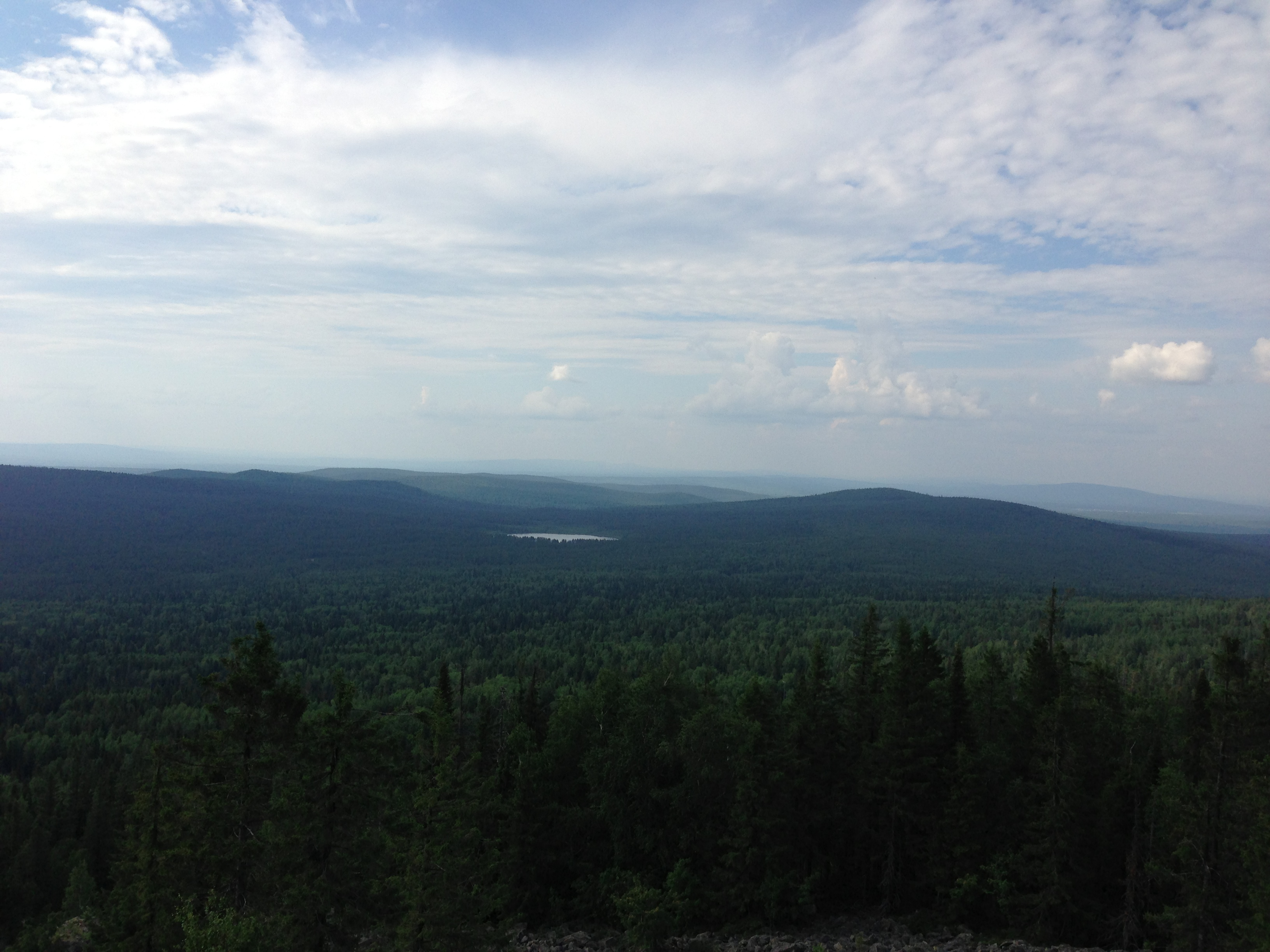 Белая гора с покрывающими её лесами, Нижний Тагил. This image is related to the protected area of Russia number 6610454